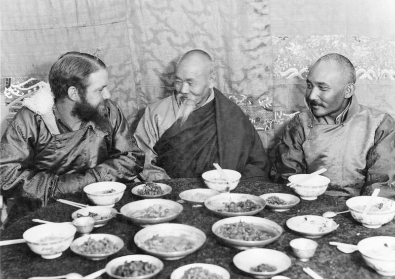 Tibetexpedition, Tashi Lhunpo, Essen mit Abt Schigatse, Dr. Schäfer als Gast beim Abt von Tashilumpo [Von links nach rechts:Schäfer, Abt von Tashilhunpo, Möndro (Möndo); Tashilumpo, Tashilhunpo, Zhaxilhünbo, Tashi Lhunpo; Shigatse] Abgebildete Personen: Schäfer, Ernst Dr.: SS-Sturmbannführer, Leiter des Sven-Hedin-Institutes, Deutschland (GND 123991420)